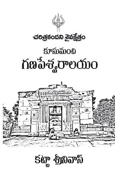 కూసుమంచి గణపేశ్వరాలయం పై వెలువడిన పుస్తక ముఖచిత్రం